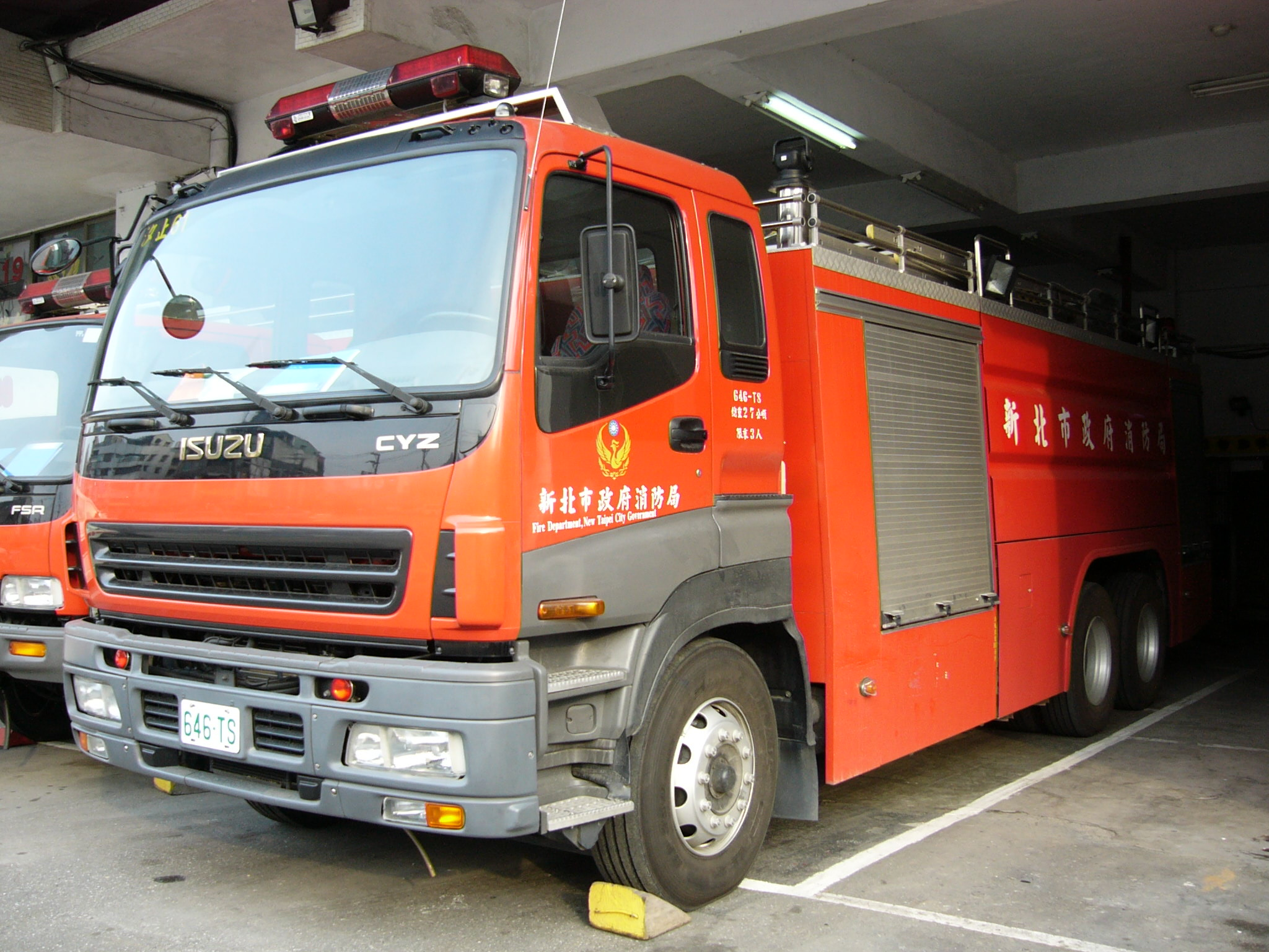 中文（台灣）: 新北市政府消防局汐止分隊五十鈴CYZ消防車646-TS。